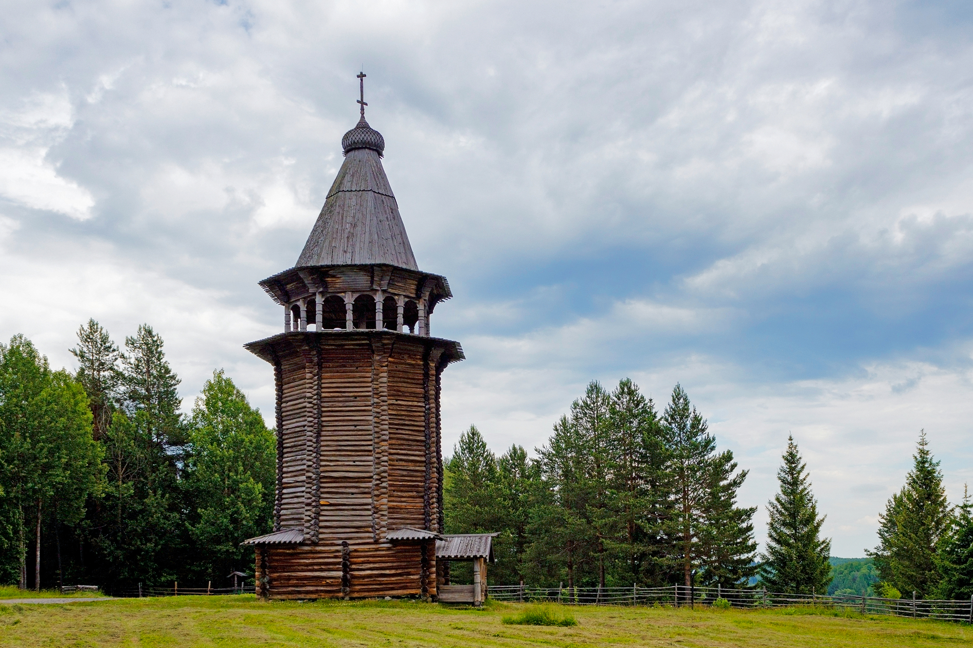 Колокольня из с. Кулига-Дракованово Красноборского района: Малые Корелы, Приморский район, Архангельская область